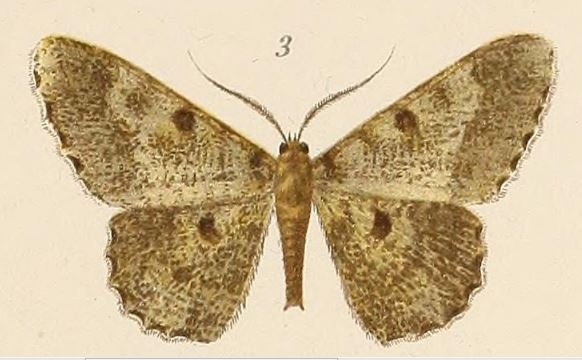 Racotis squalida squalida (Butler, 1878) Boarmia Voeltzkowii Platte 6 - fig. 03